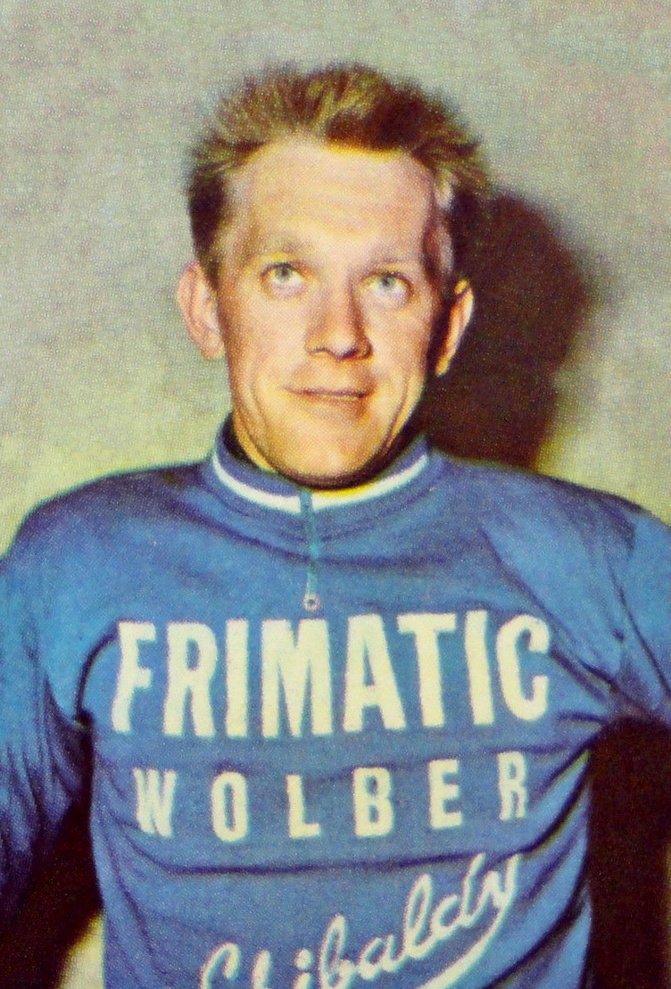 CAMPIONI DELLO SPORT 1969/70-n.217-HAGMANN (SVI)-CICLISMO-rec